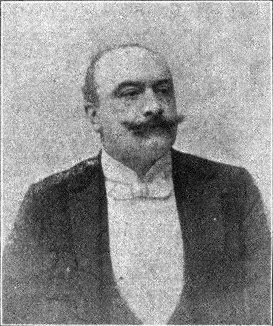 Österreichischer Politiker, Reichsratswahl 1907, Name siehe Dateiname